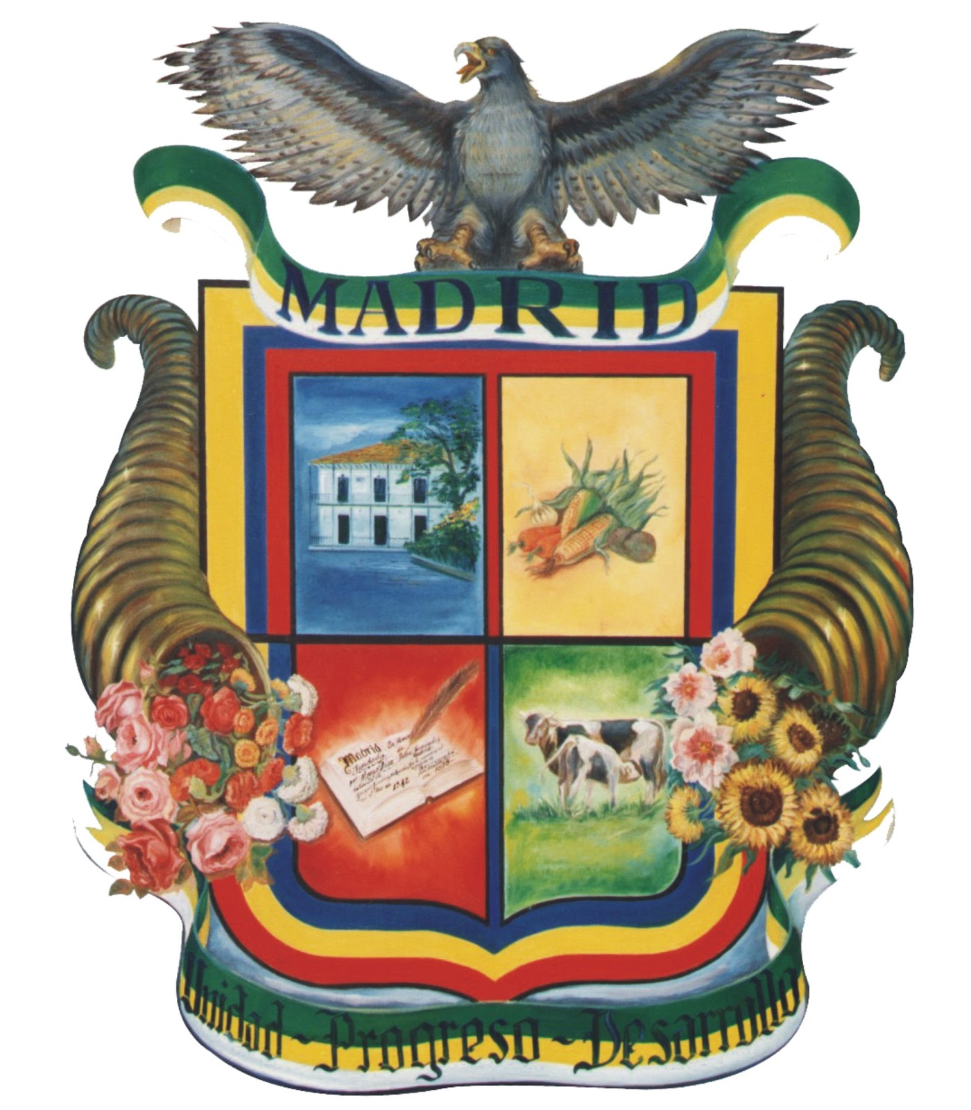 Escudo del Municipio de Madrid Cundinamarca